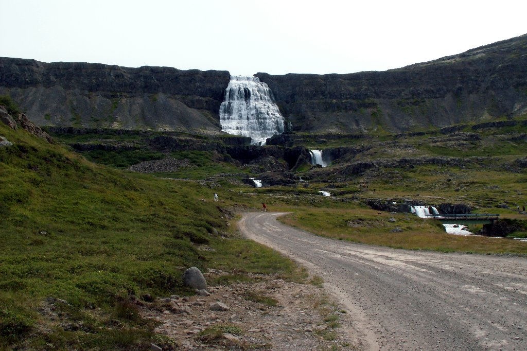 Dynjandi waterfalls, Iceland